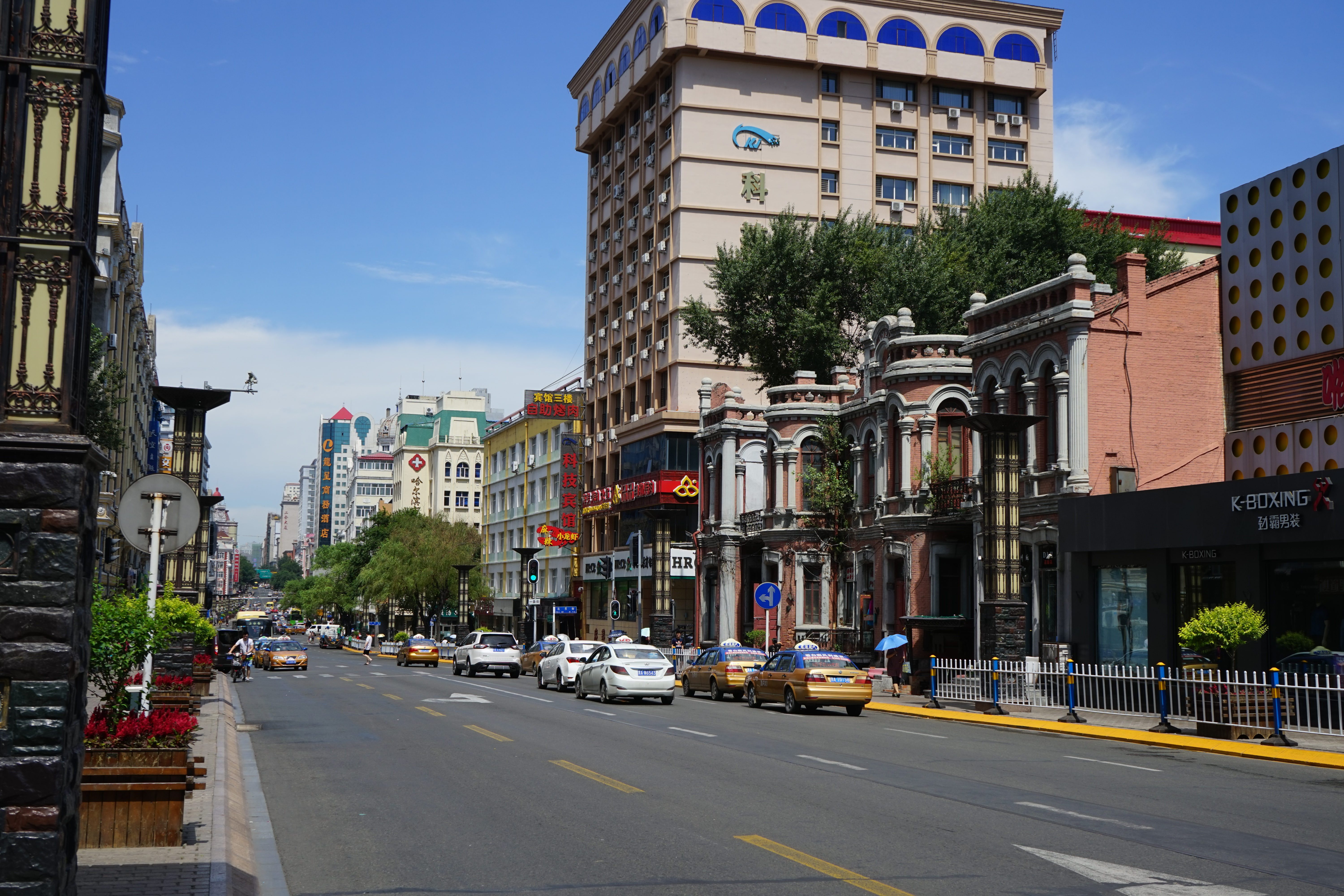 中文（中国大陆）: 果戈里大街，近与洁净街交汇处